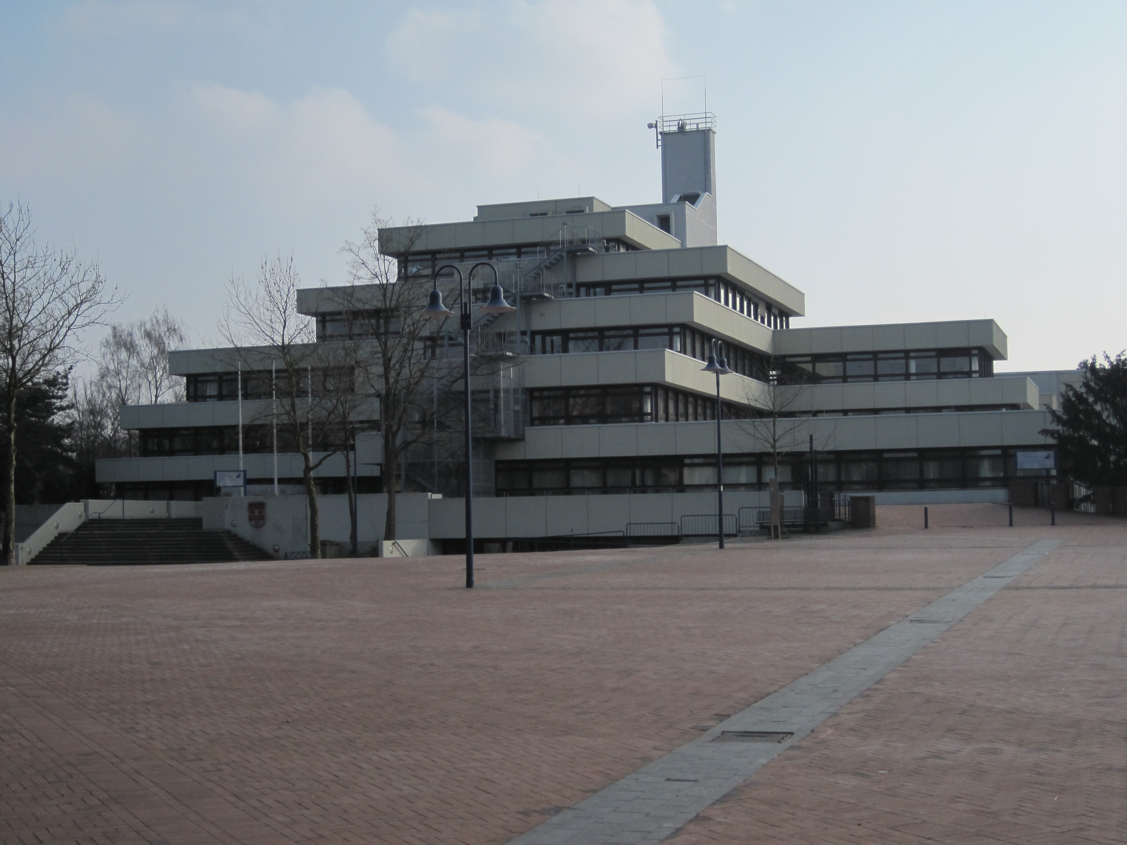 Das Foto zeigt das Rathaus Bockum-Hövel mit Blick vom Marktplatz.